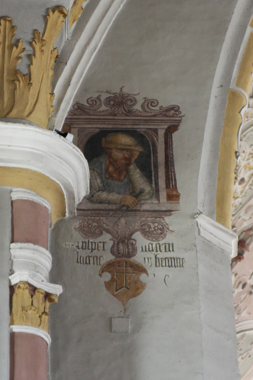 Portrait des Baumeisters Sebastian Junger in der Pfarrkirche St. Laurentius Altheim, OÖ